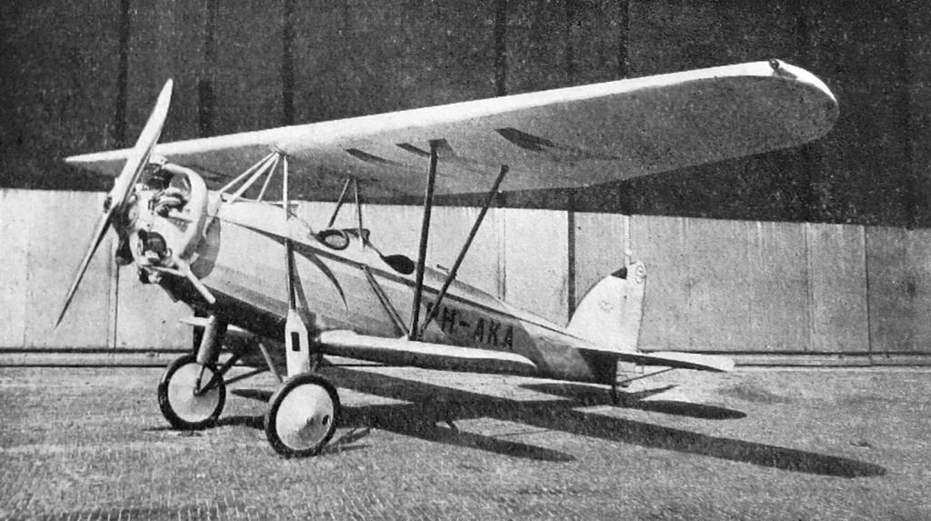 Walter Vega a Pander E85 (PH-AKA)